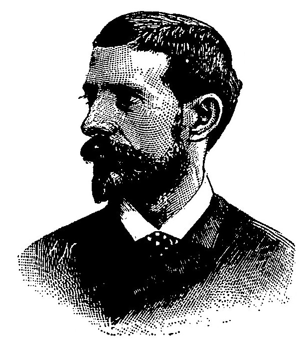 "M. Martineau (XIXe Arr., Ire circ.)".